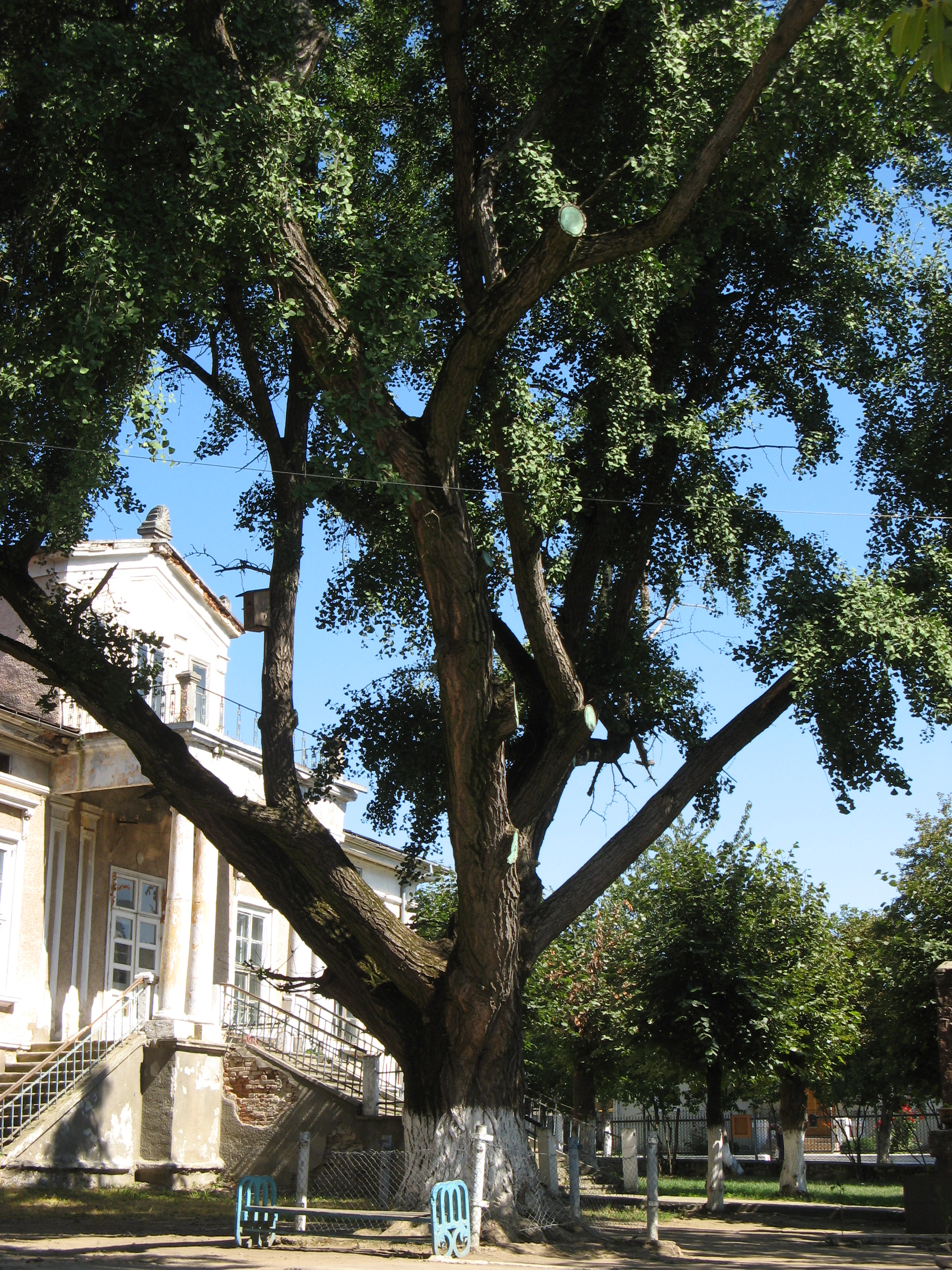 Гінкго дволопатеве (Тернопільська область). Тернопільська обл., м. Заліщики